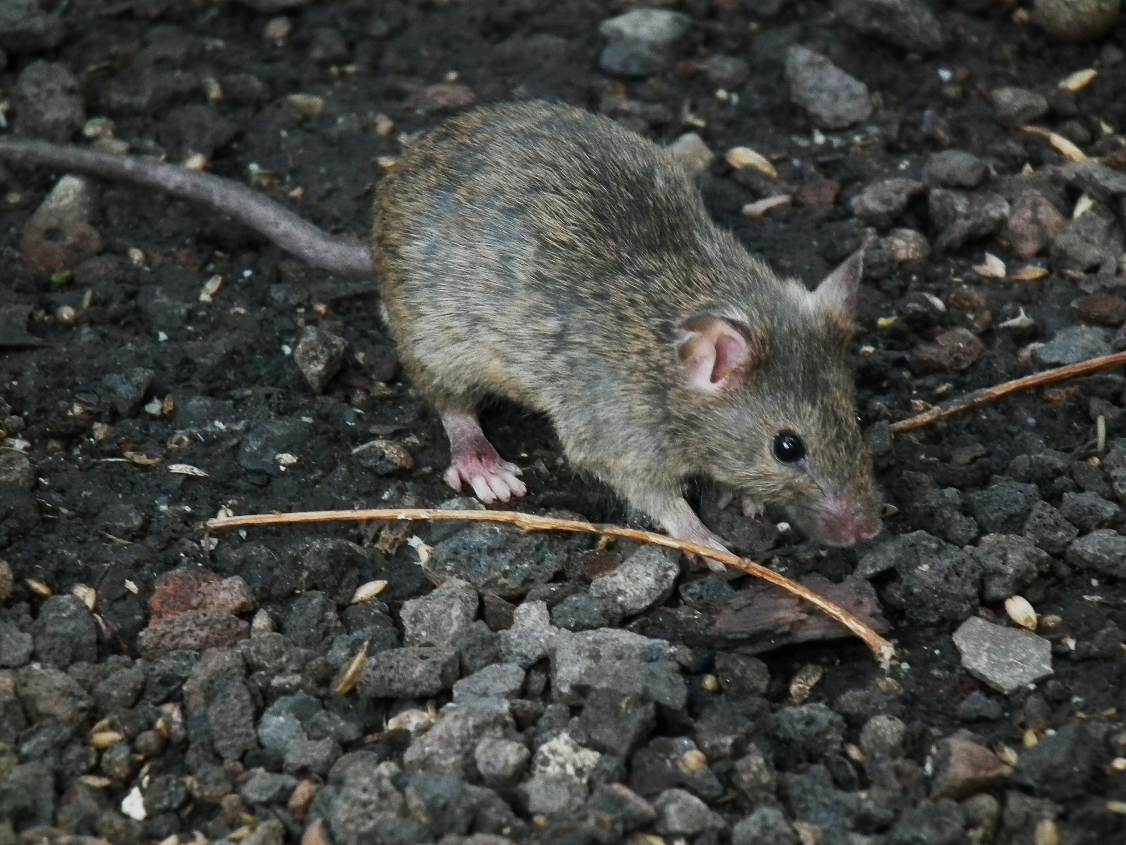 Hausmaus (Mus musculus) mit Verletzung am rechten Hinterbein, fotografiert im nördlichen Baden-Württemberg (Deutschland)